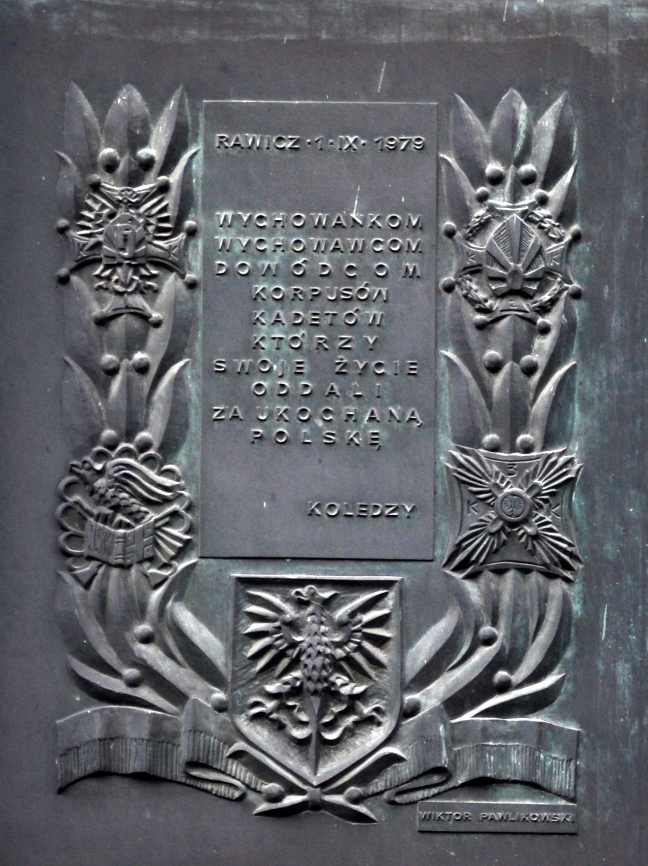 Tablica pamiątkowa dotycząca korpusu kadetów nr 3 w Rawiczu. Tablica przykręcona jest na gmachu ówczesych koszar korpusu. W 2010 szpital powiatowy